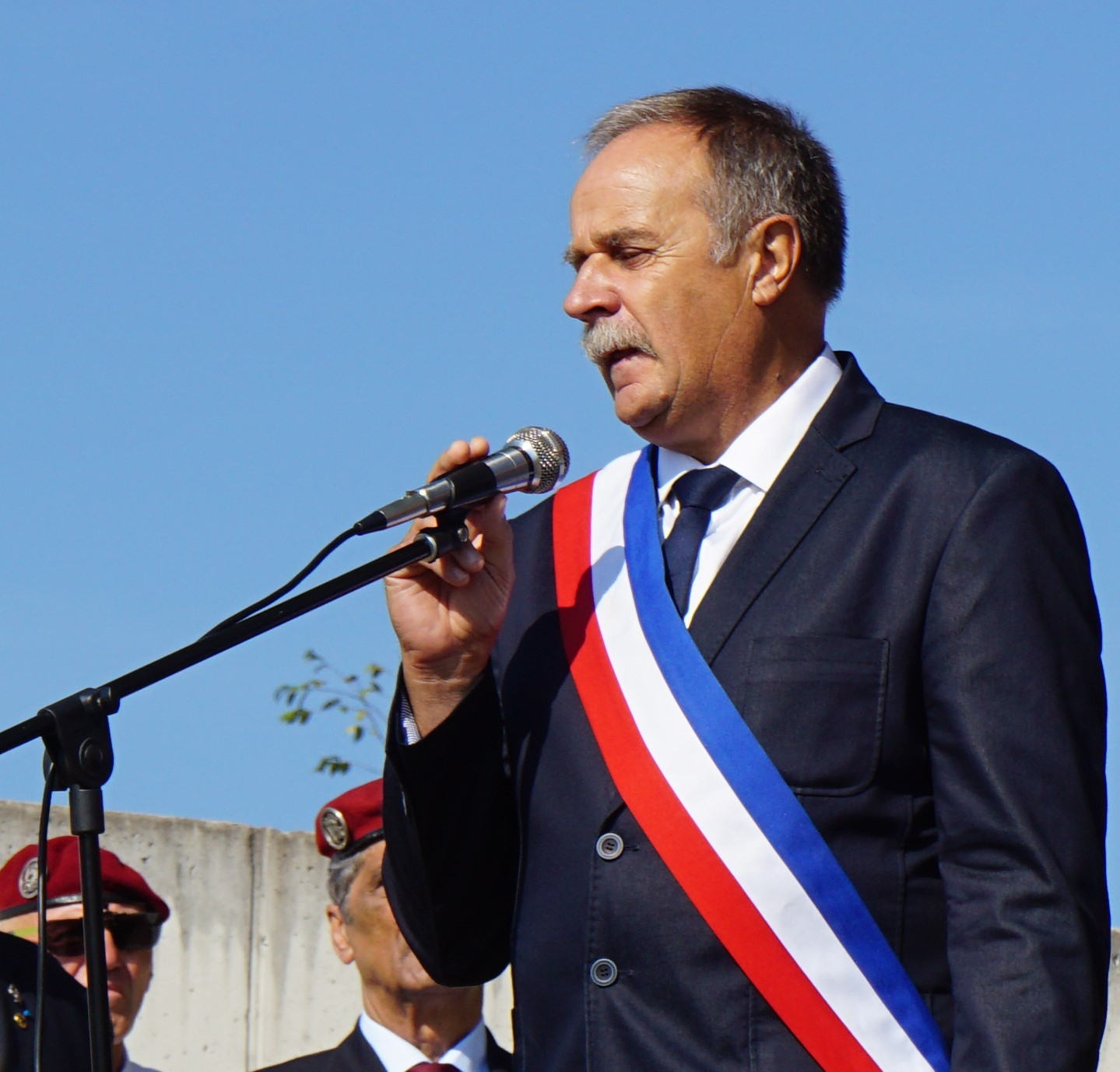 Le maire de Ronchamp, Jean-Claude Mille, lors de l'hommage rendu aux parachutistes libérateurs de la ville ; au sommet de la colline de Bourlémont, suivi d'une messe dans la chapelle Notre-Dame-du-Haut. Personality rights warning Although this work is freely licensed or in the public domain, the person(s) shown may have rights that legally restrict certain re-uses unless those depicted consent to such uses. In these cases, a model release or other evidence of consent could protect you from infringement claims.